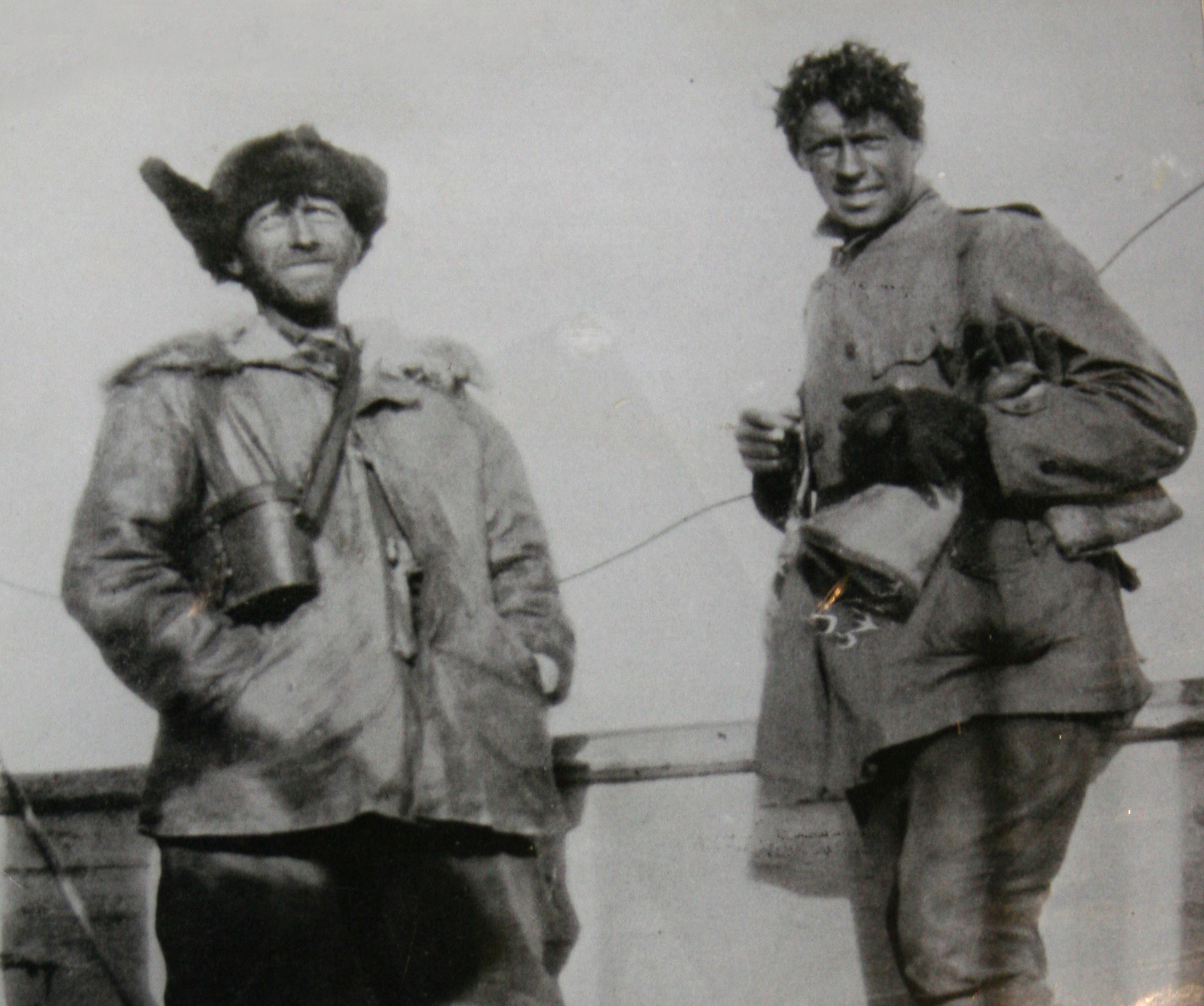 Foresto Sparso, Gennaro Sora e Sjef Van Dongen, ripresa e caricata da Giorces. Trasmessa a l'autorizzazione Del Sig. Sindaco che si ringrazia per la collaborazione. OTRS 2007072910017171